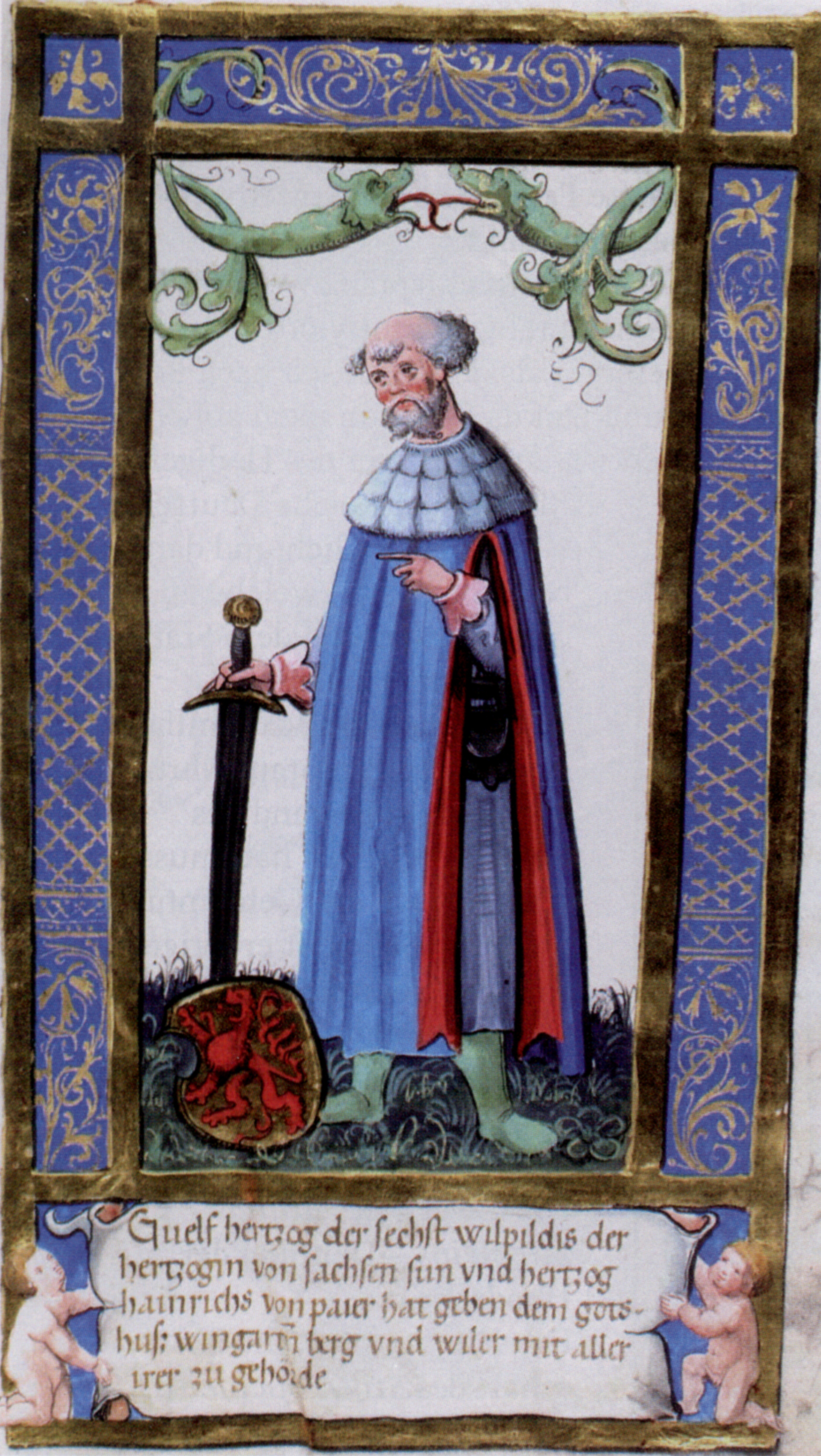 Stifterbüchlein, entstanden um 1500 für die Reichsabtei Weingarten, Stuttgart, Württembergische Landesbibliothek, Cod. hist. Q 584, fol. 38v, Welf VI.